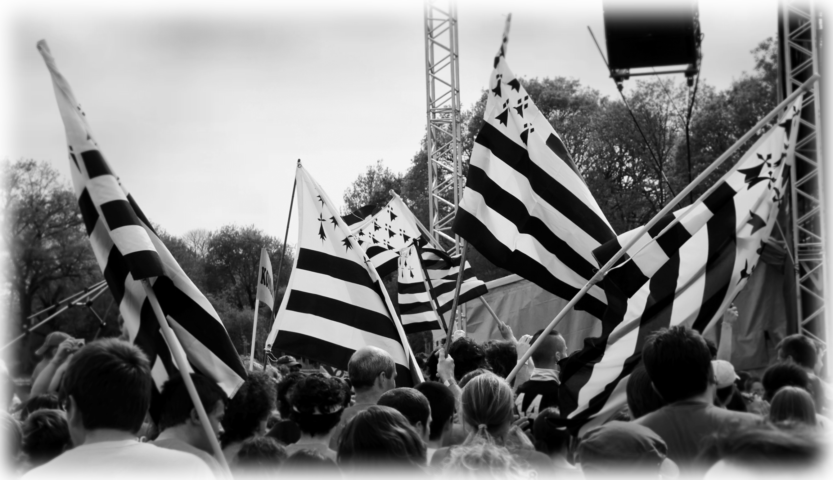 Flotte de drapeaux bretons lors des 30 ans de DIWAN à Carhaix